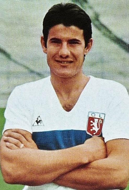 André Guy en 1970 (O. lyonnais), 'Ageducatifs 1970 - 1971', Panini figurina n°84.